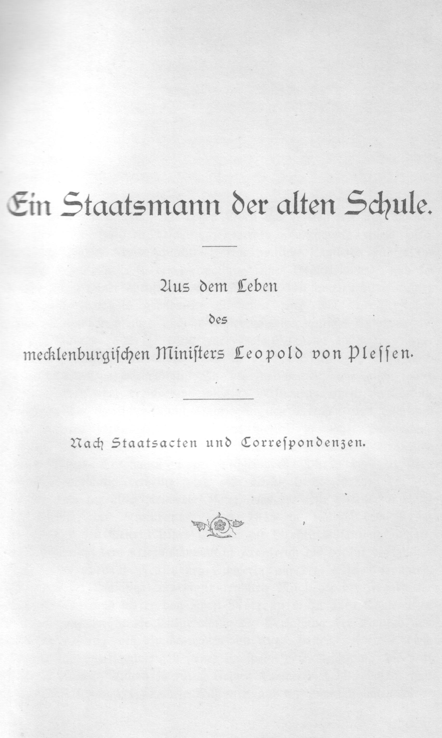 Drittes Blatt des nachstenden Buchbandes Von einem Deutschen Fürstenhofe, Bd. 2, Herausgeber: seine Witwe, Hinstorff`sche Buchhandlung, Wismar Datum: Erscheinungsjahr 1896 Urheber: Ludwig von Hirschfeld